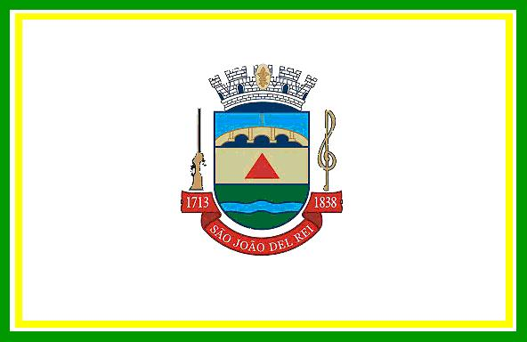 Bandeira do Município de São João del-Rei, Minas Gerais, Brasil